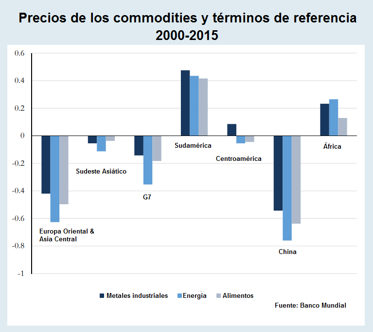 Precios de los commodities y términos de referencia 2000-2015. Fuente: The Commodity Cycle in Latin America: Mirages and Dilemmas. Banco Mundial. Autores: Augusto de la Torre, Alain Ize, Federico Filippini y Martin Sasson, 2016. ISBN (electronic): 978-1-4648-0914-9